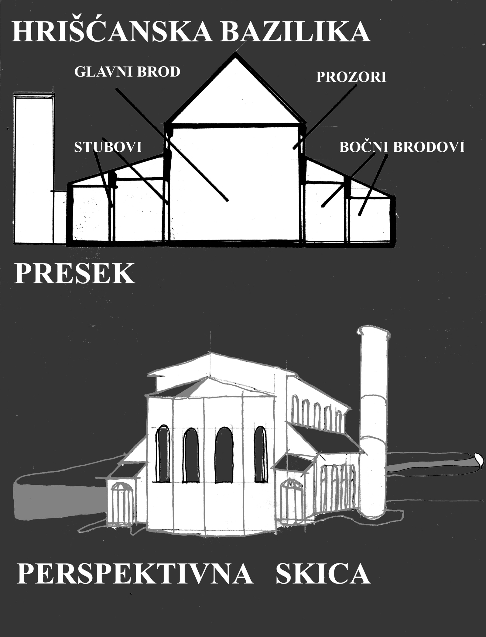 crtež napravljen na hartiji i skeniran